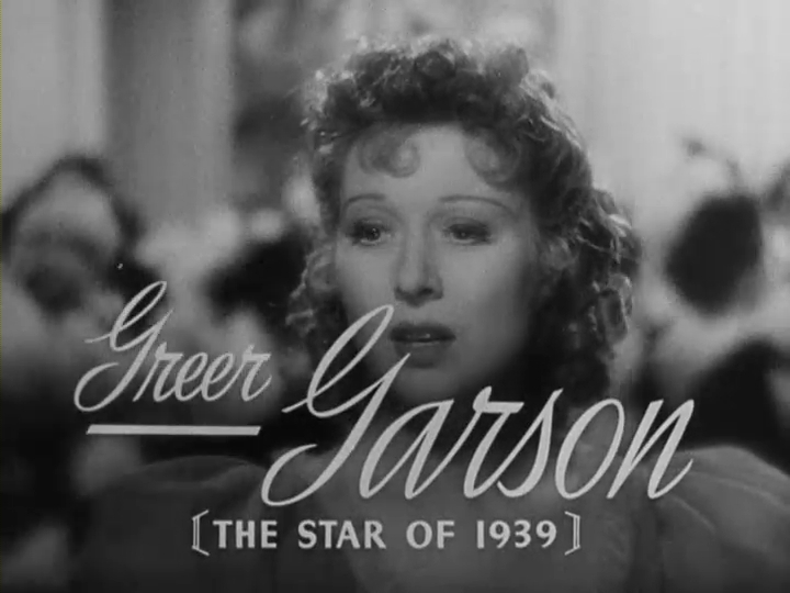 1939年製作の映画『チップス先生さようなら』の予告編動画より。チップス先生の妻キャサリンを演じるグリア・ガースン